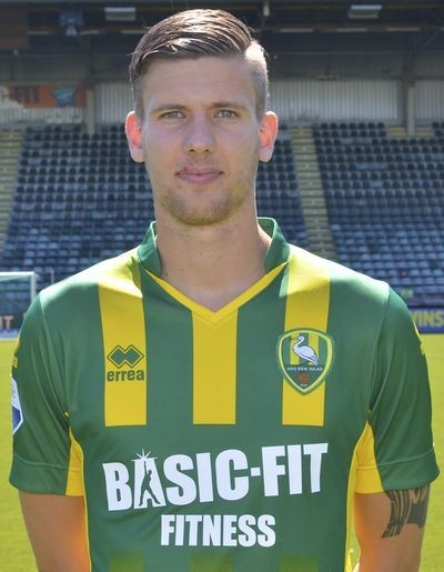 Michiel Kramer